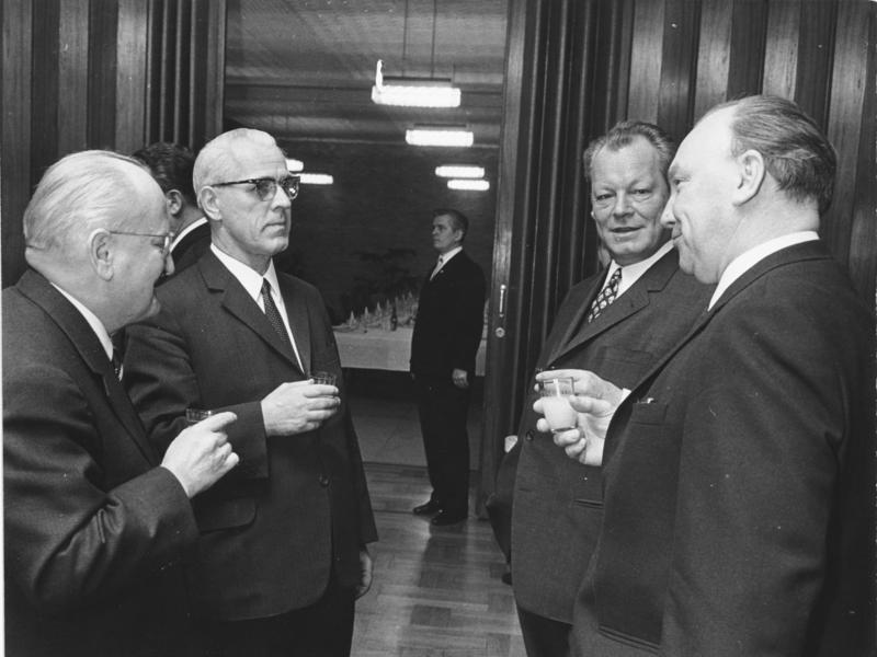 Brandt/Stoph - Treffen in Erfurt am 19.3.1970